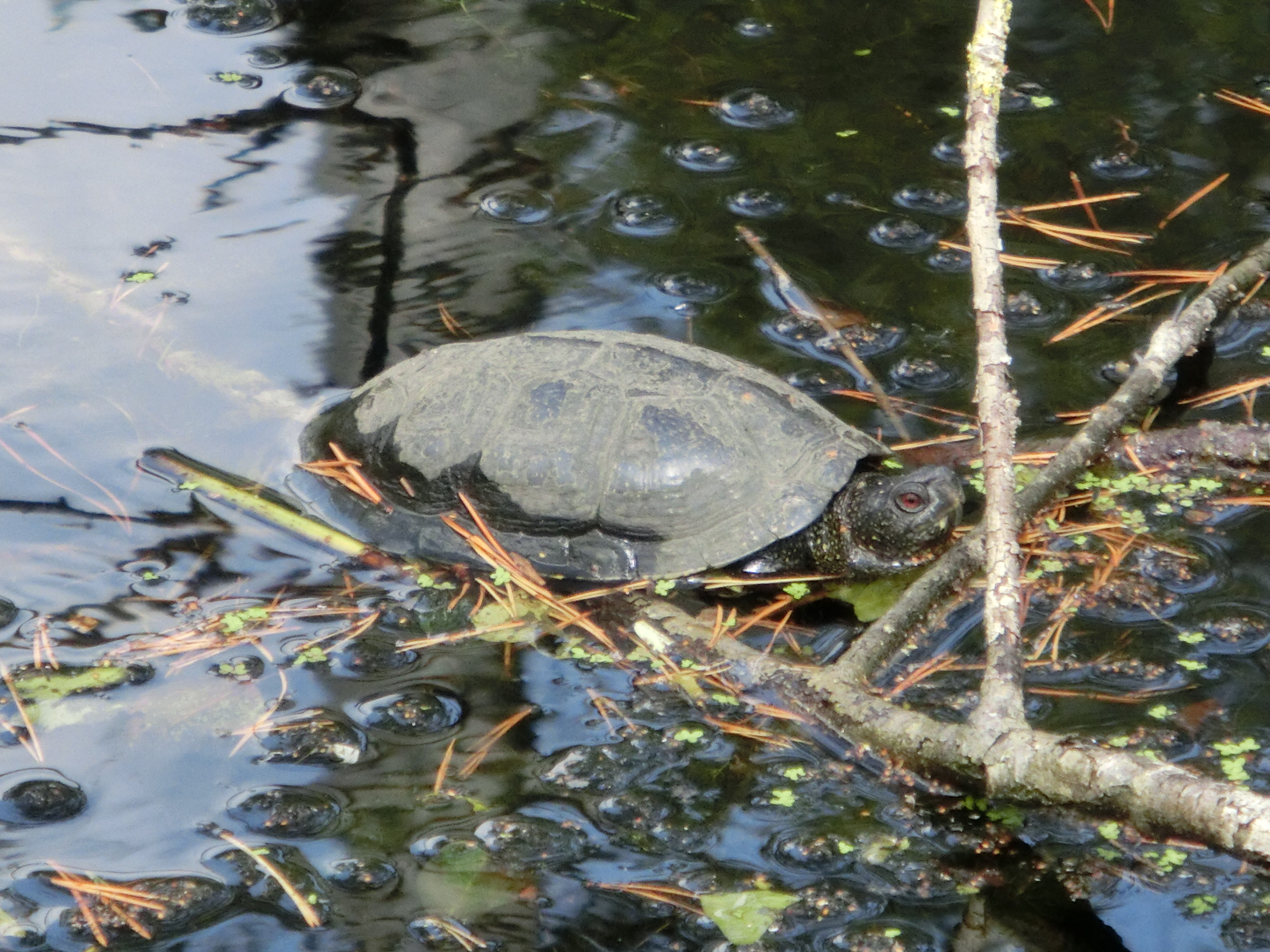 Deutschland - Baden-Württemberg - Landkreis Sigmaringen: Pfrunger-Burgweiler-Ried, Europäische Sumpfschildkröte (Emys orbicularis)